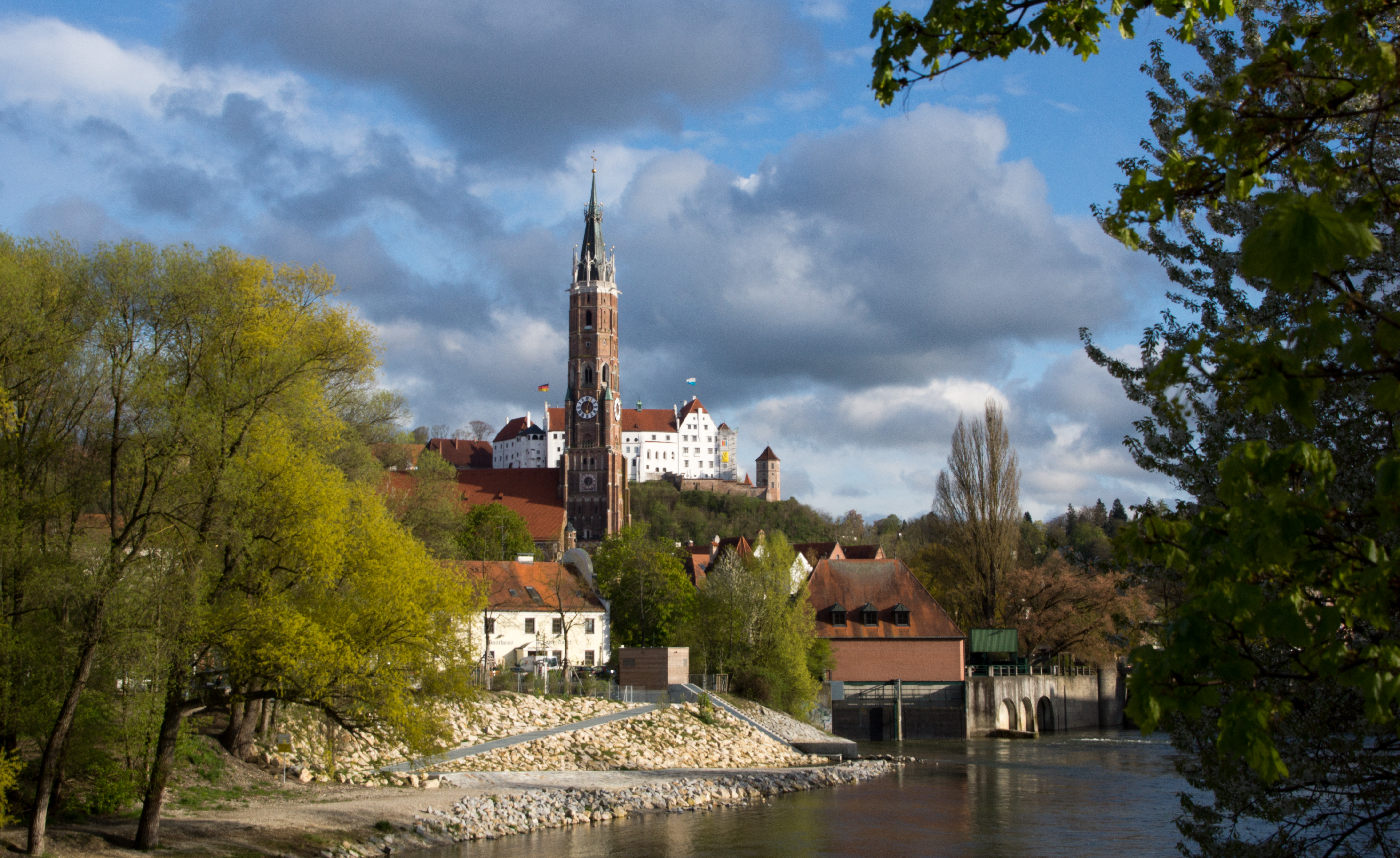 Kleine Isar und St. Martinskirche und Burg Trausnitz, Landshut